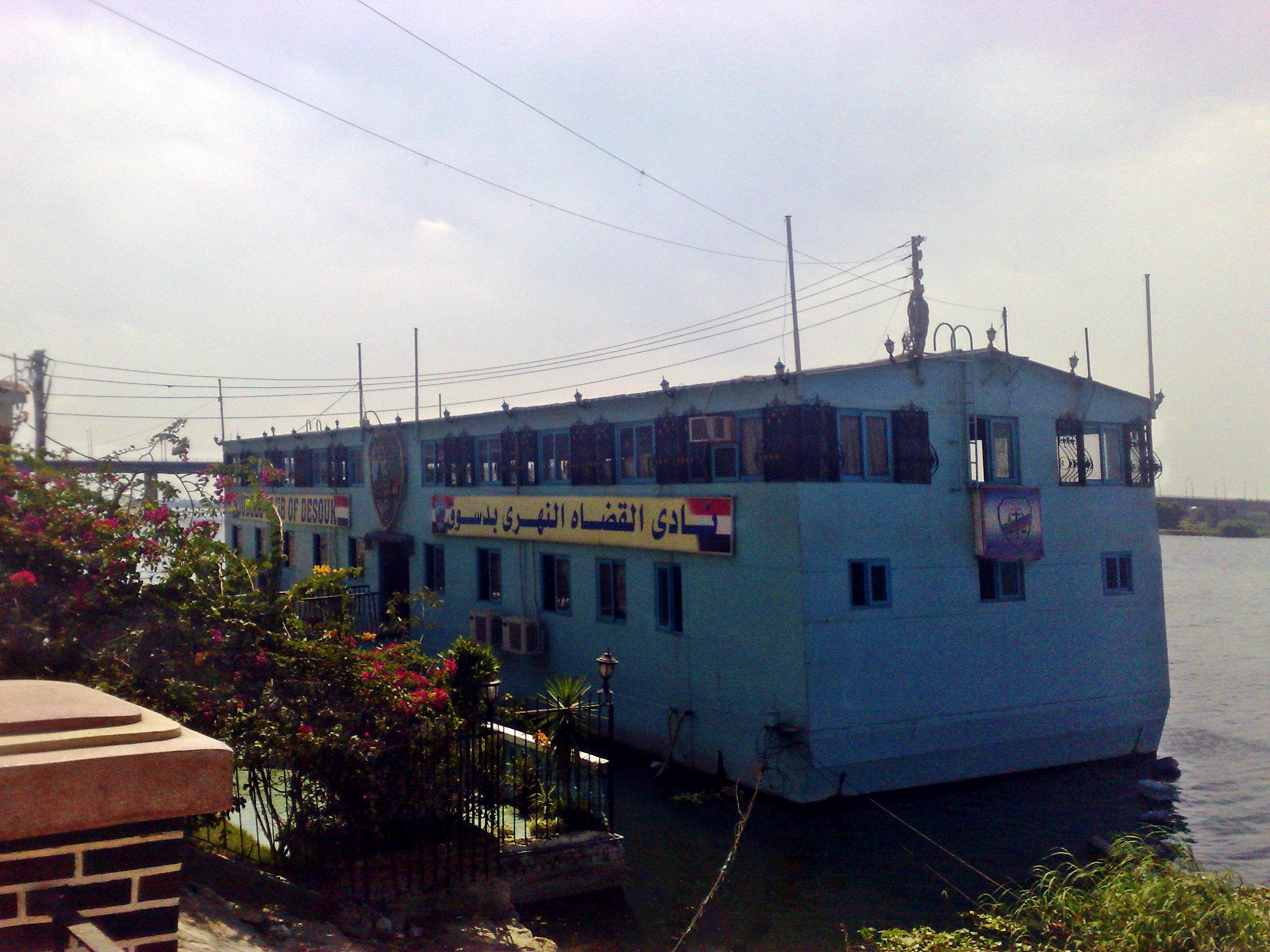 نادي القضاة النهري بدسوق، مصر